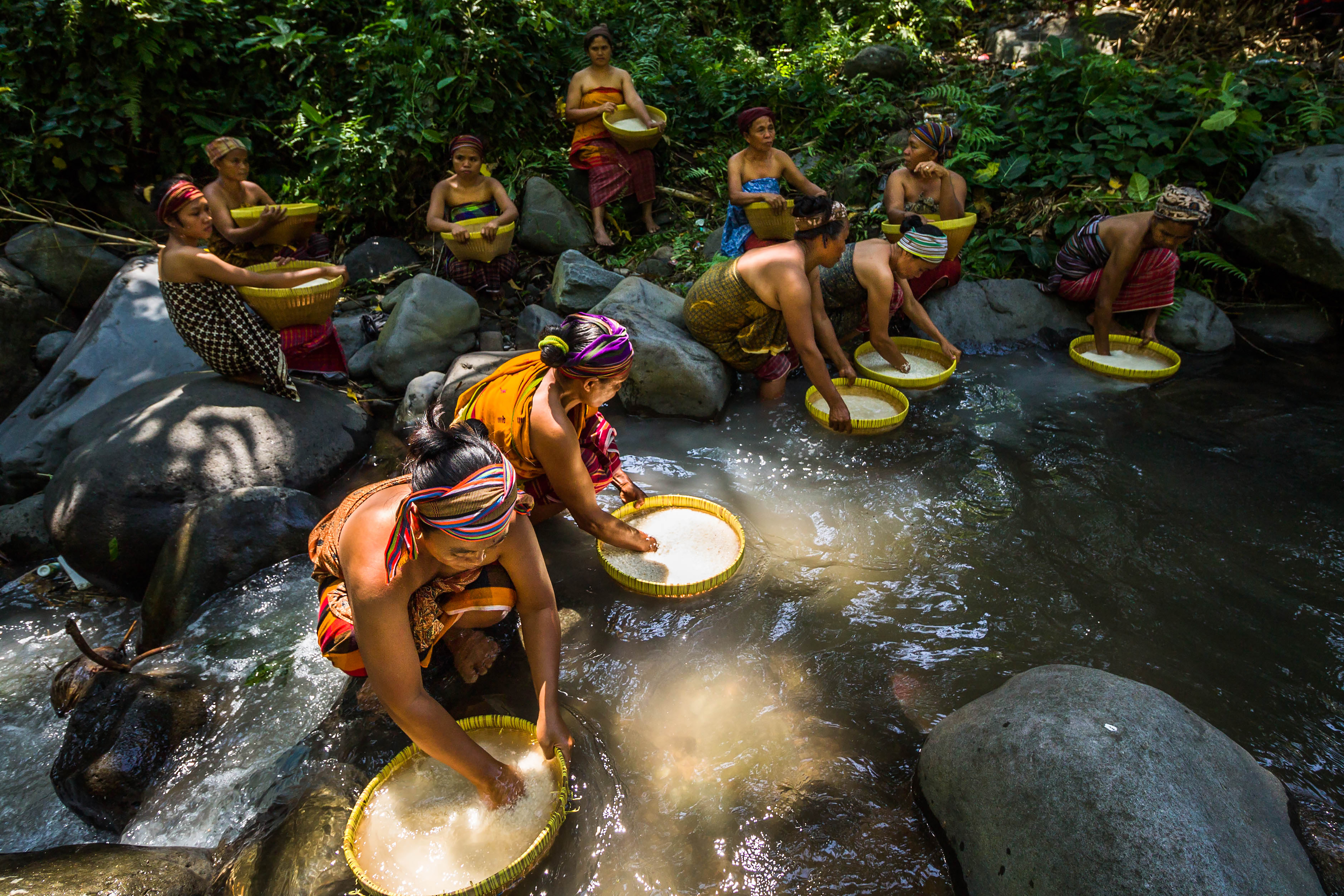 Tradisi mencuci beras. Tradisi gotong royong yang dilakukan saat maulid adat suka Bayan Lombok Utara.